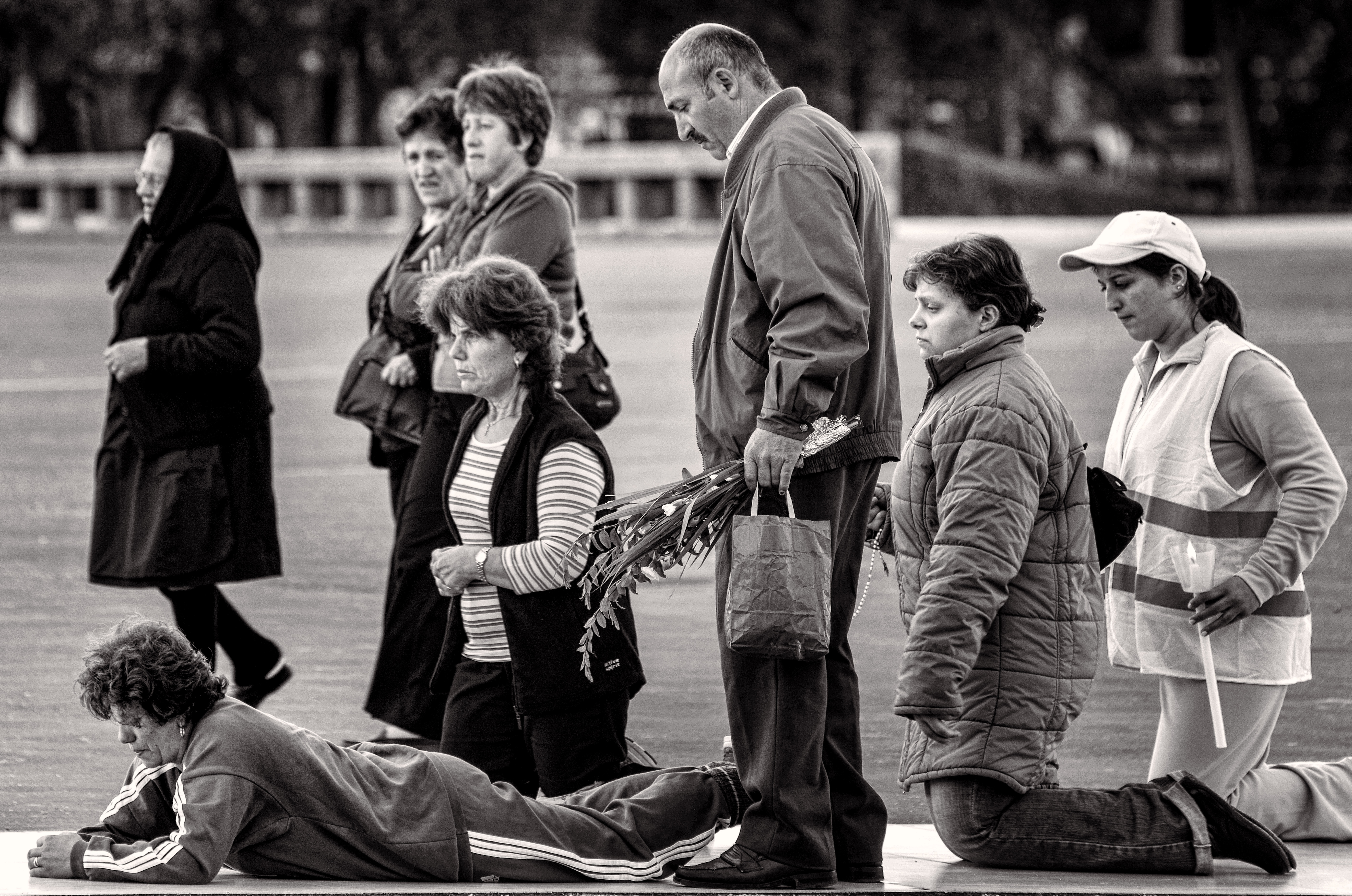 Fátima uit 'Dolen, onderweg in Europa' - (uitgeverij Lannoo - Tielt, 2009)